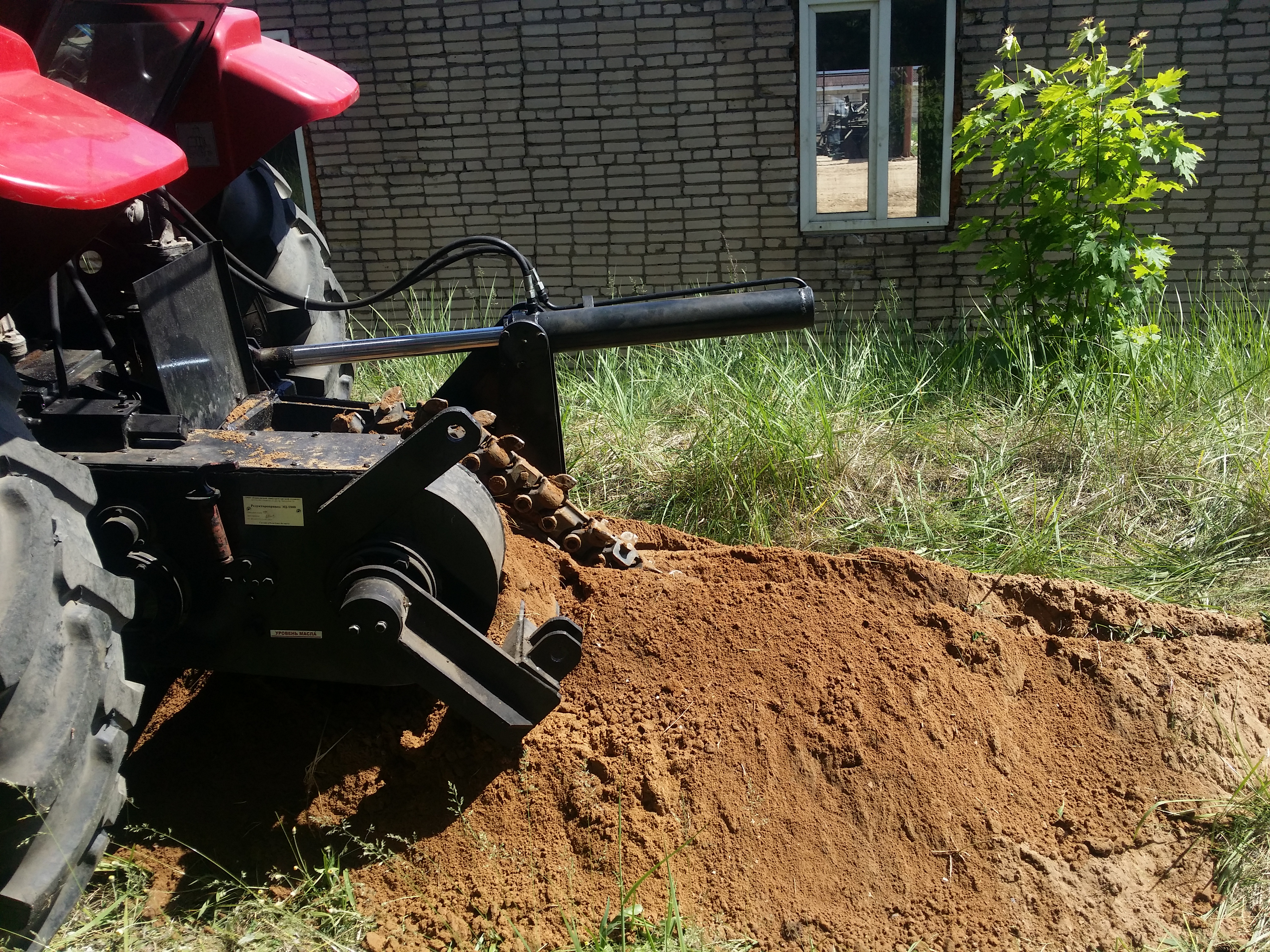 Отрывка траншеи цепным экскаватором